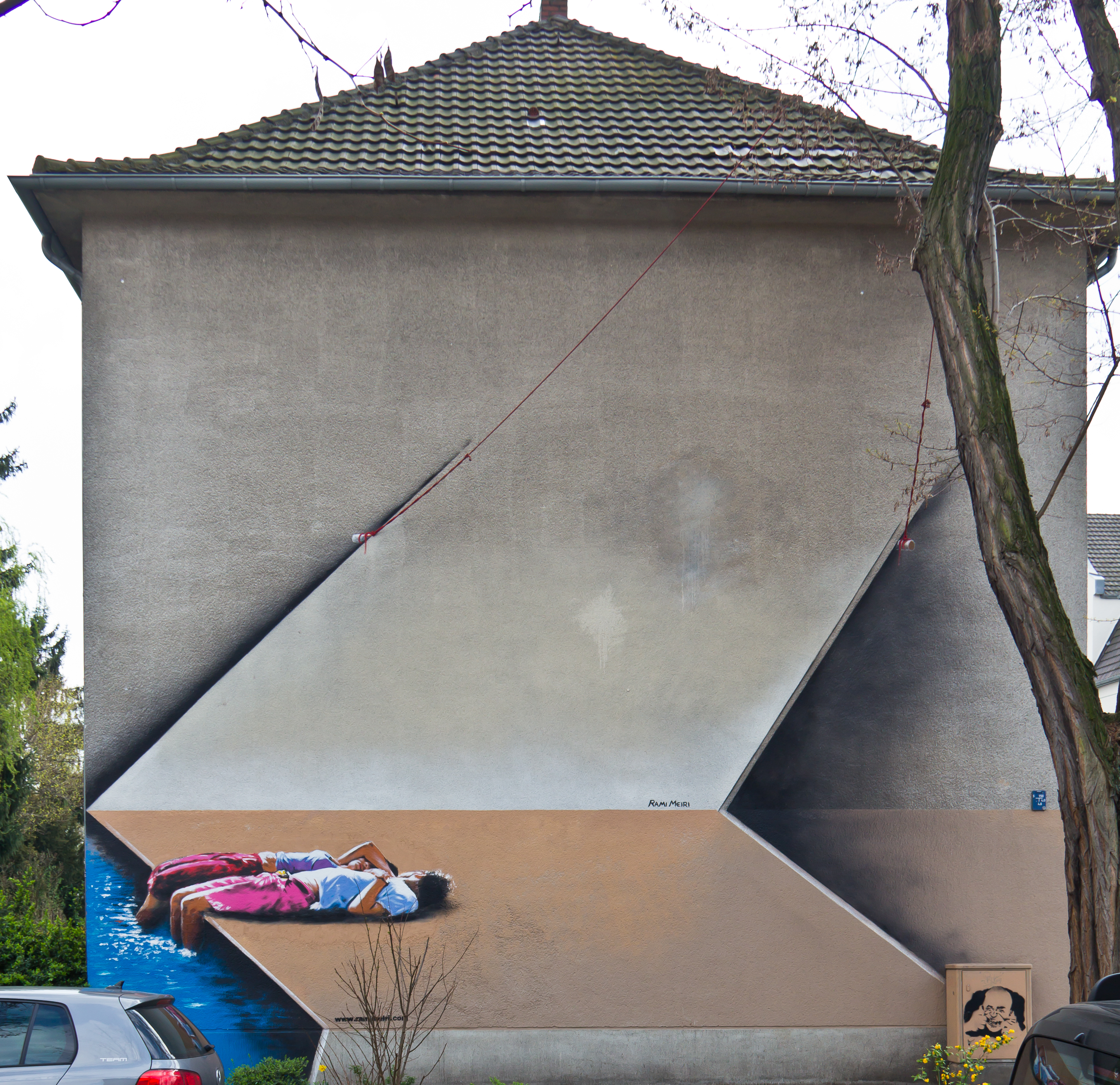 Graffiti am Wohnhaus Iltisstraße 84-90, Ecke Gravensteiner Straße